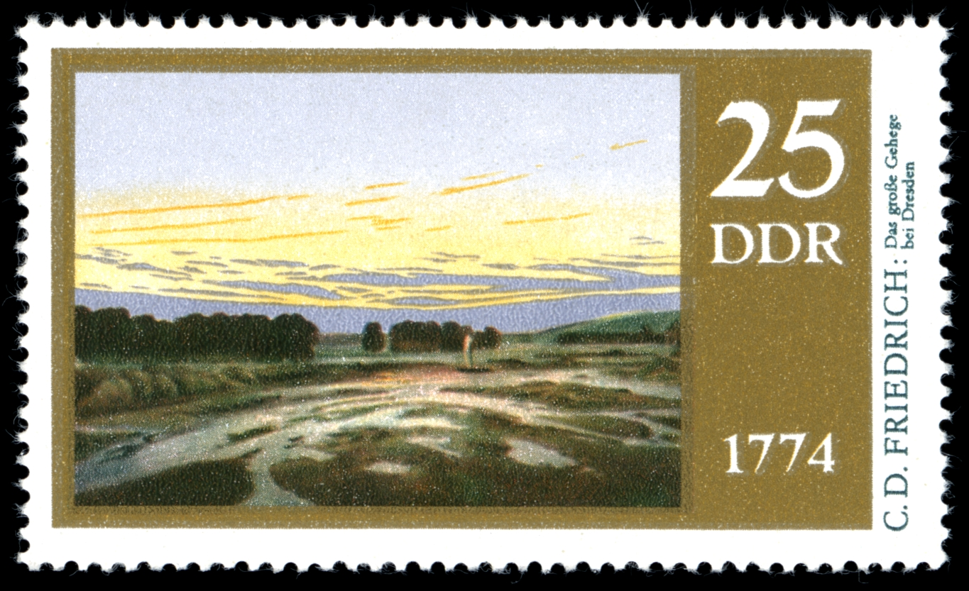 Information: 200. Geburtstag von Caspar David Friedrich: Das große Gehege bei Dresden Ausgabepreis: 25 Pfennig First Day of Issue / Erstausgabetag: 21. Mai 1974 Auflage: 3.500.000 Entwurf: Naumann Druckverfahren: Rastertiefdruck Michel-Katalog-Nr: Ländercode-MiNr: 1960